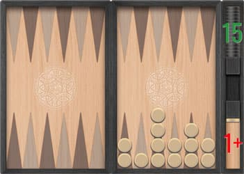 Оин в нардах